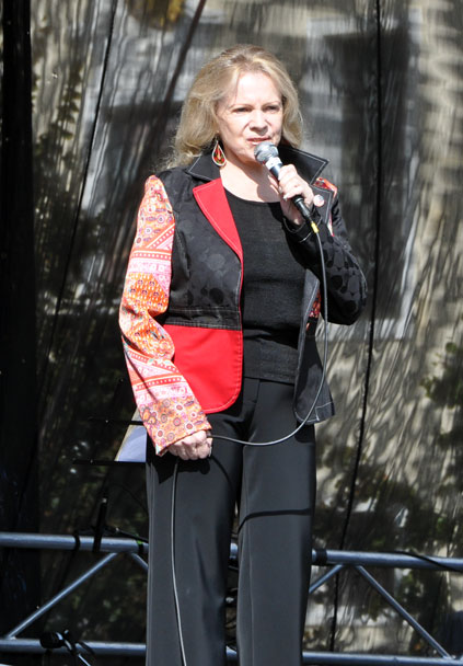 Eva Pilarová